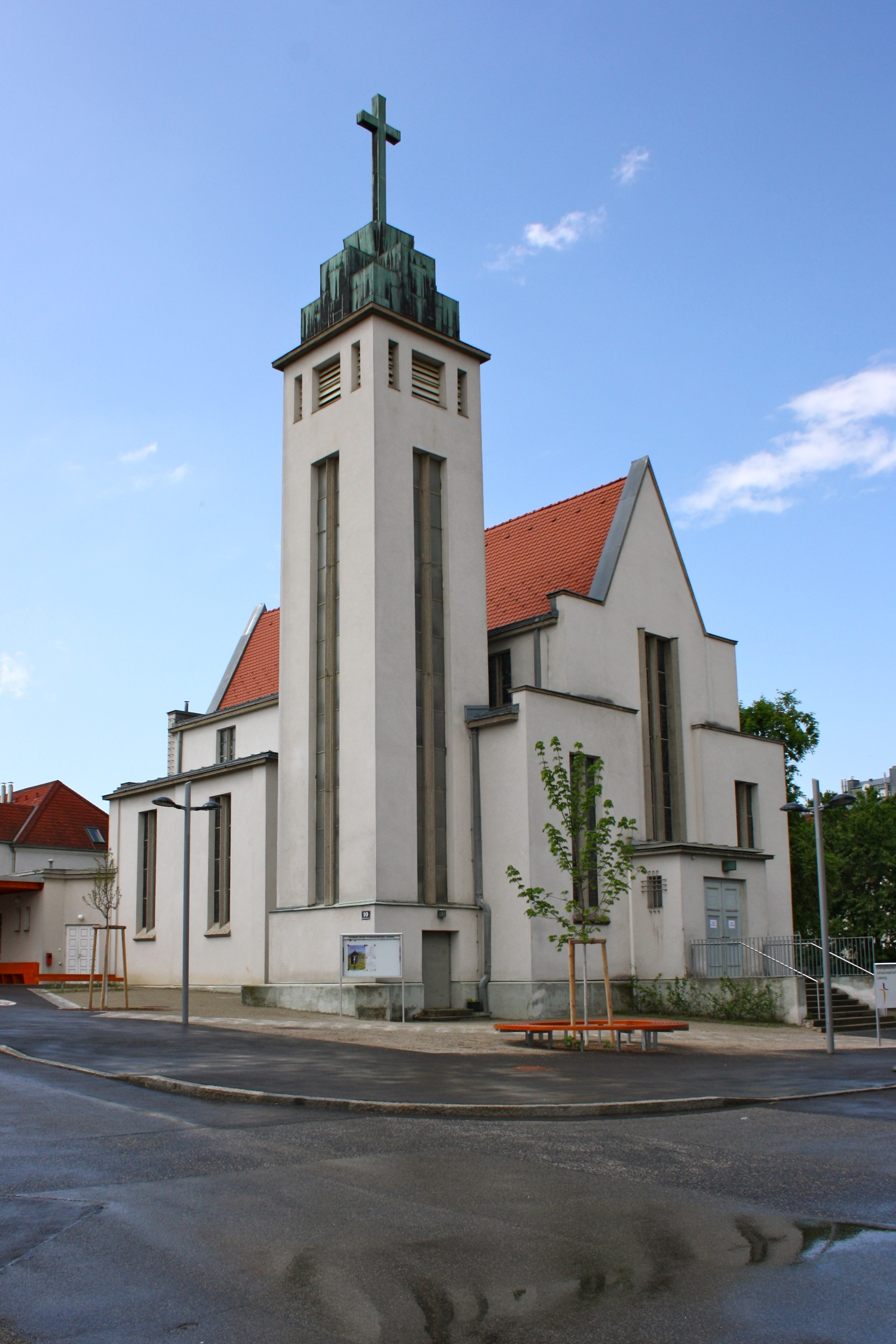 Evang. Pfarrkirche A.B., Johanneskirche